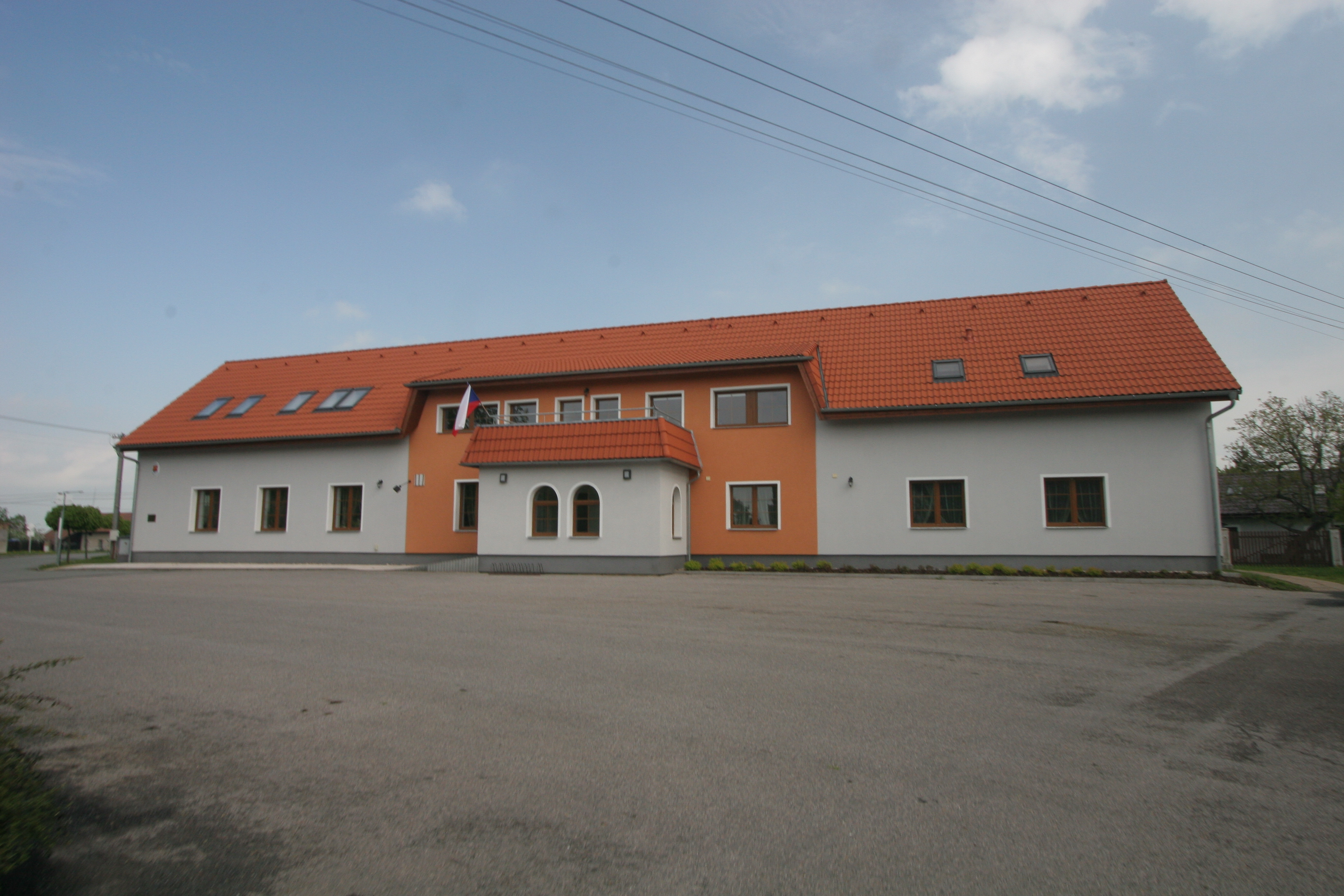 Obědovice obecní úřad